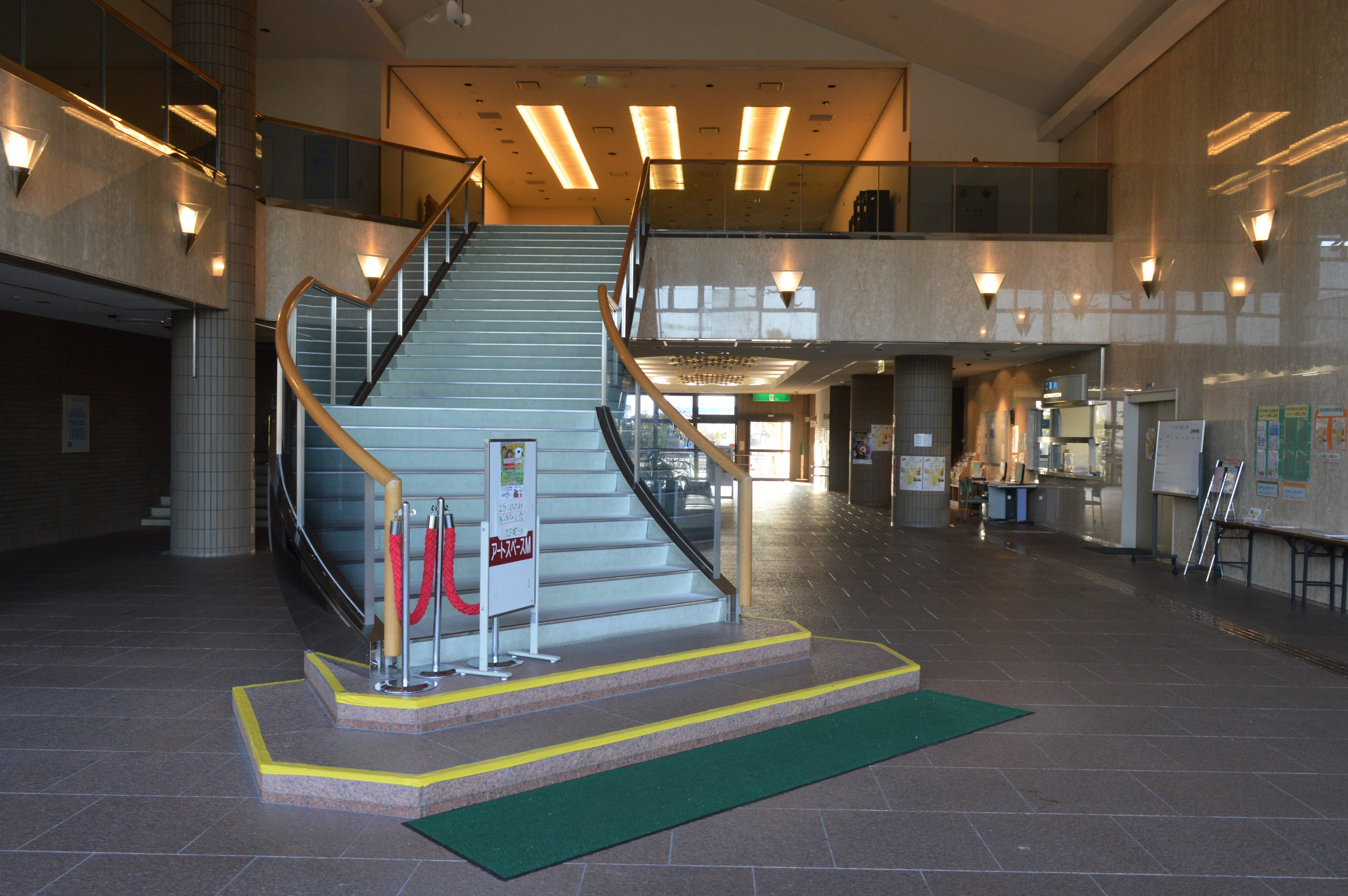 愛知県あま市のあま市美和文化会館。1階の内部。